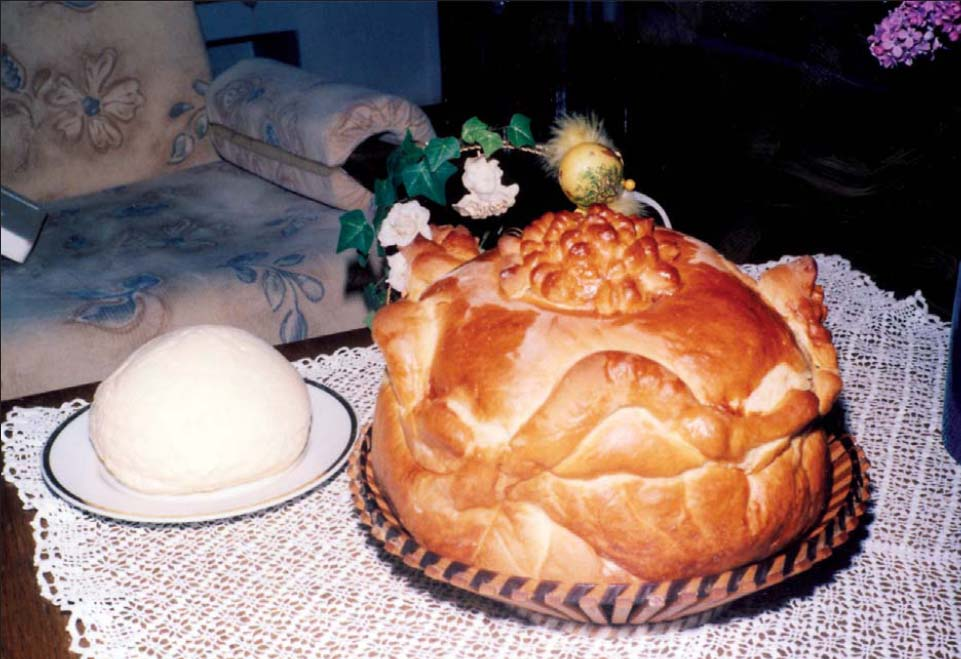 Uskrsnja hrana: sirac i uskrsnji kruh